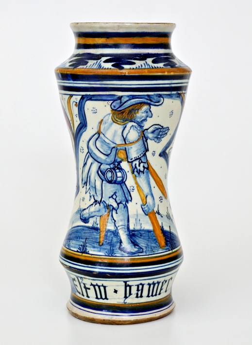 Albarello di Pesaro del XV secolo